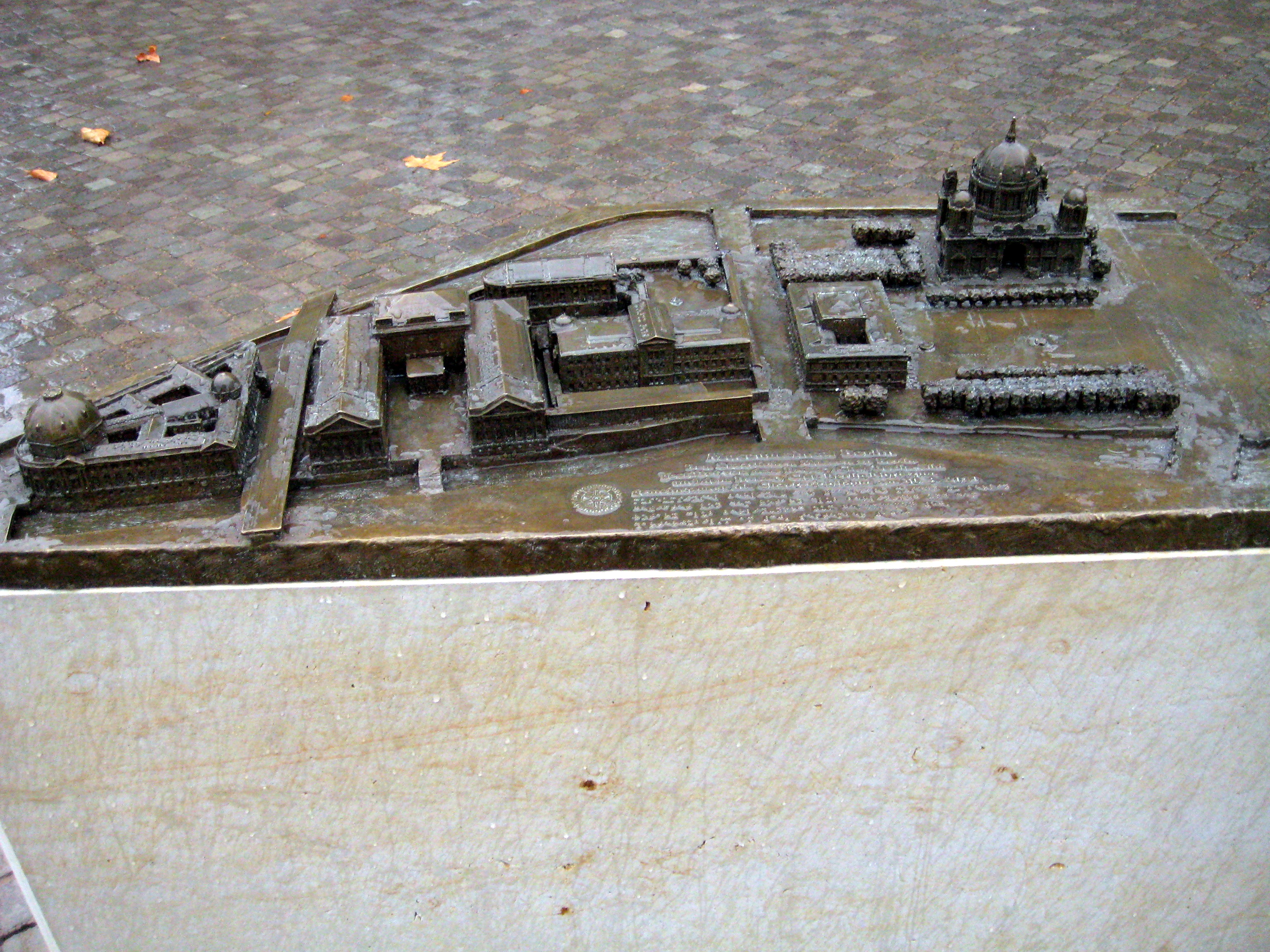 Tastmodell Museumsinsel Berlin